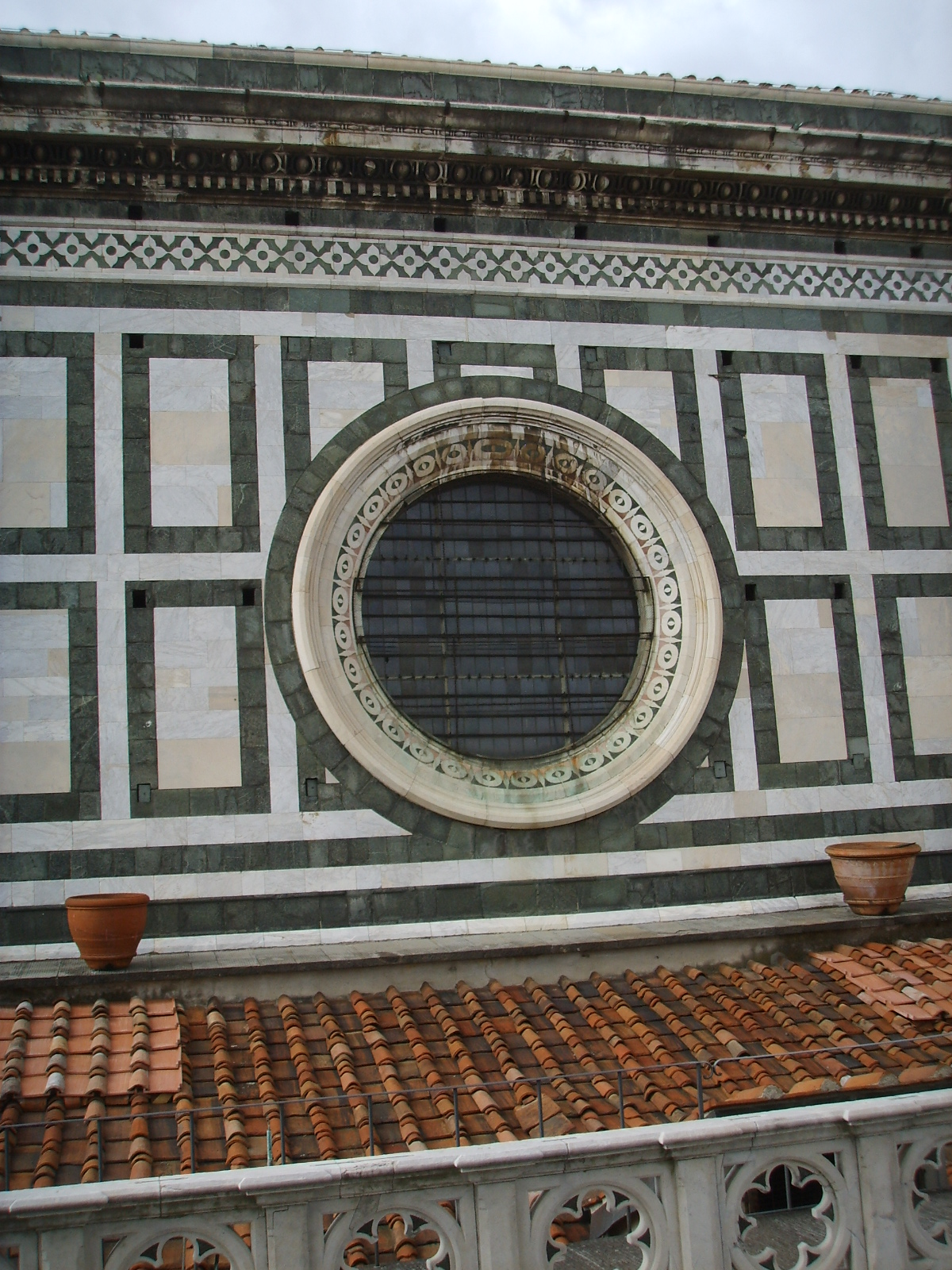 Santa Maria del Fiore a Firenze, Oculo.